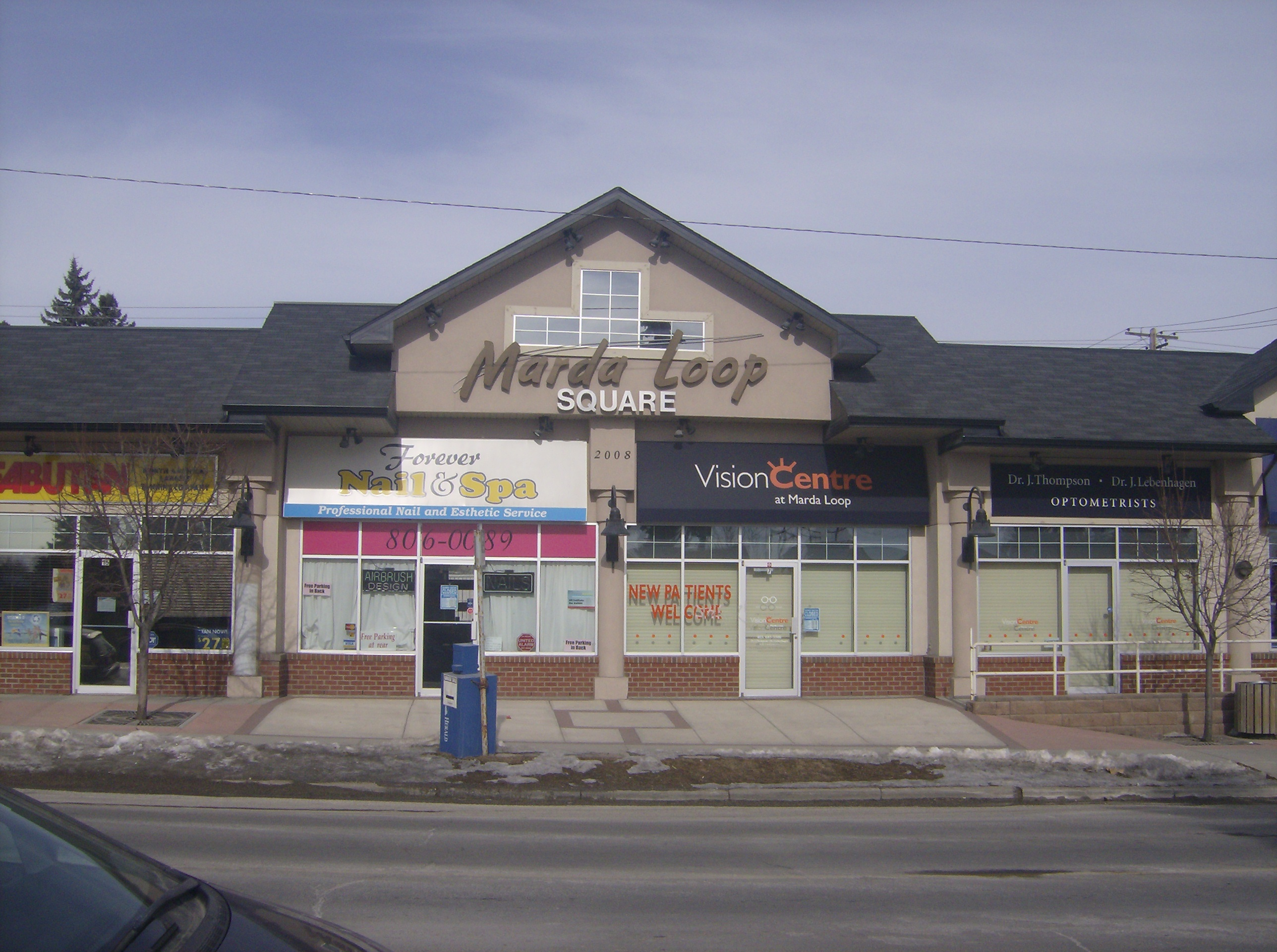 Marda Loop Square in Marda Loop, Calgary, Alberta, Canada